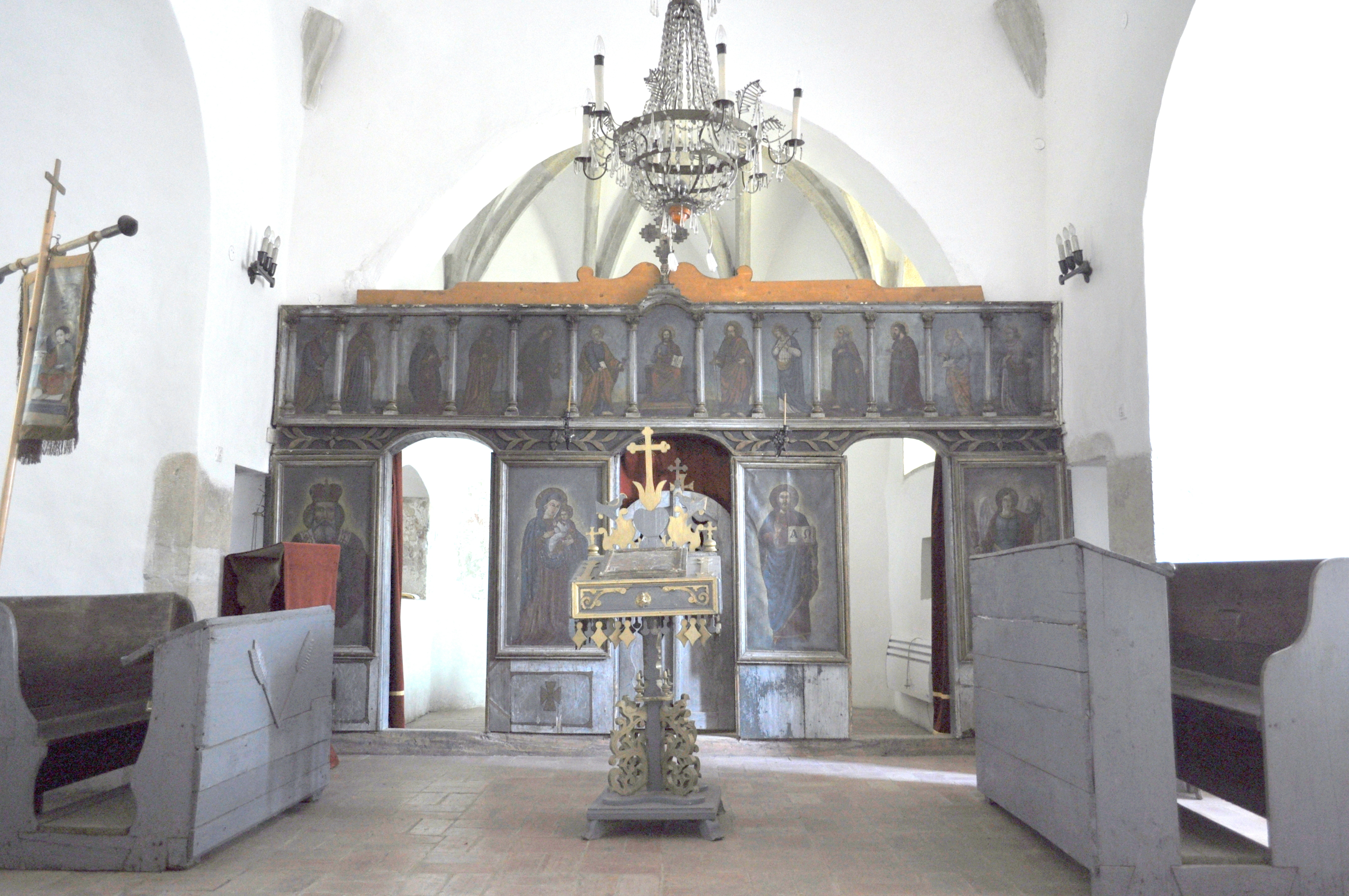 Biserica "Adormirea Maicii Domnului" a mănăstirii Vadului , sat Vad, județul Cluj